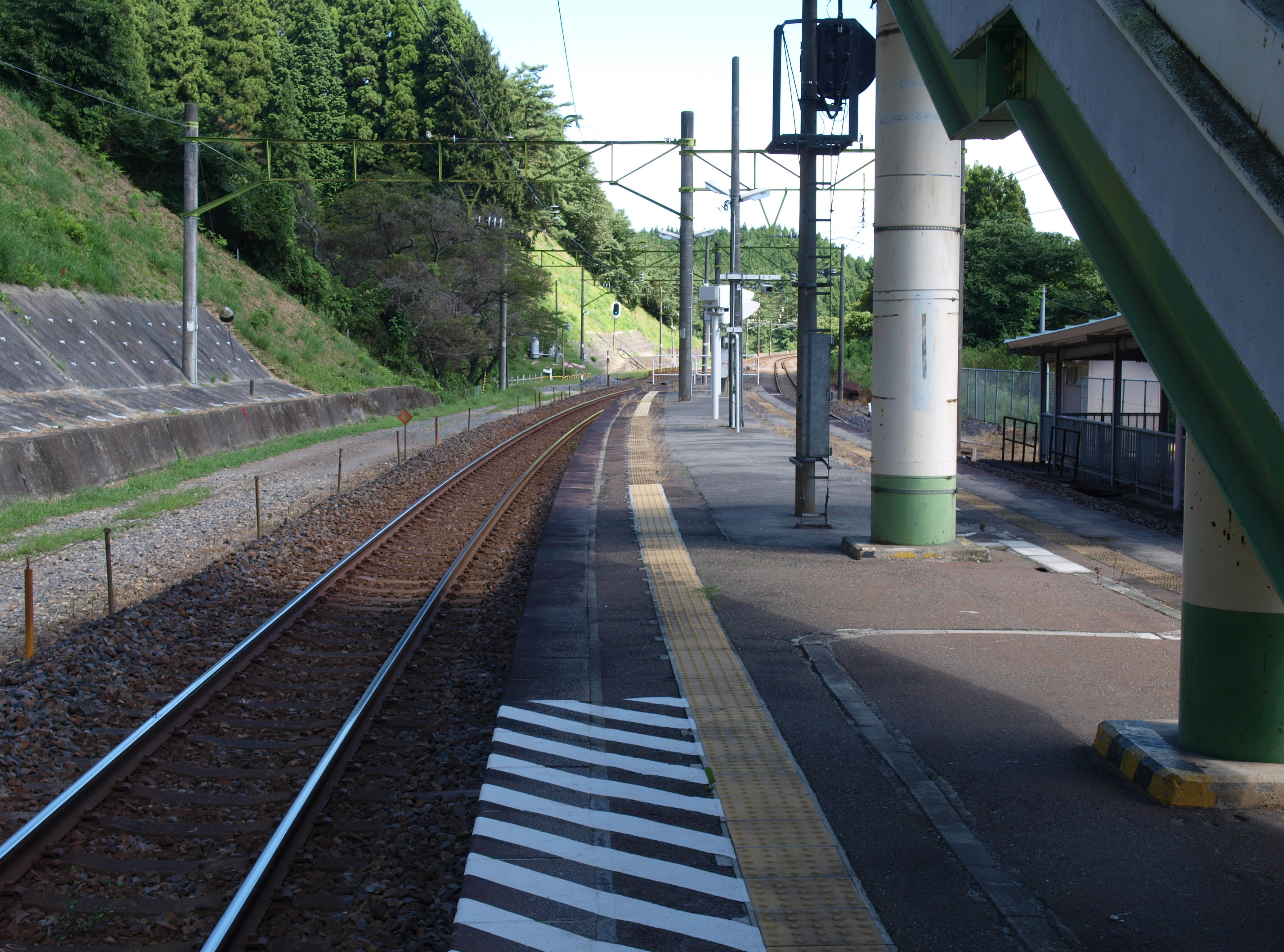 豊原駅プラットホーム